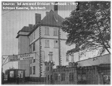 Schloss-Kaserne in Butzbach (Stabsgebäude mit Kasernentor während der US Zeit)